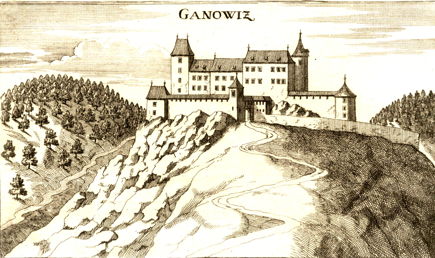 Burg Gonobitz/Slovenske Konjice in Slowenien nach einem Kupferstich von Georg Matthäus Vischer, um 1680